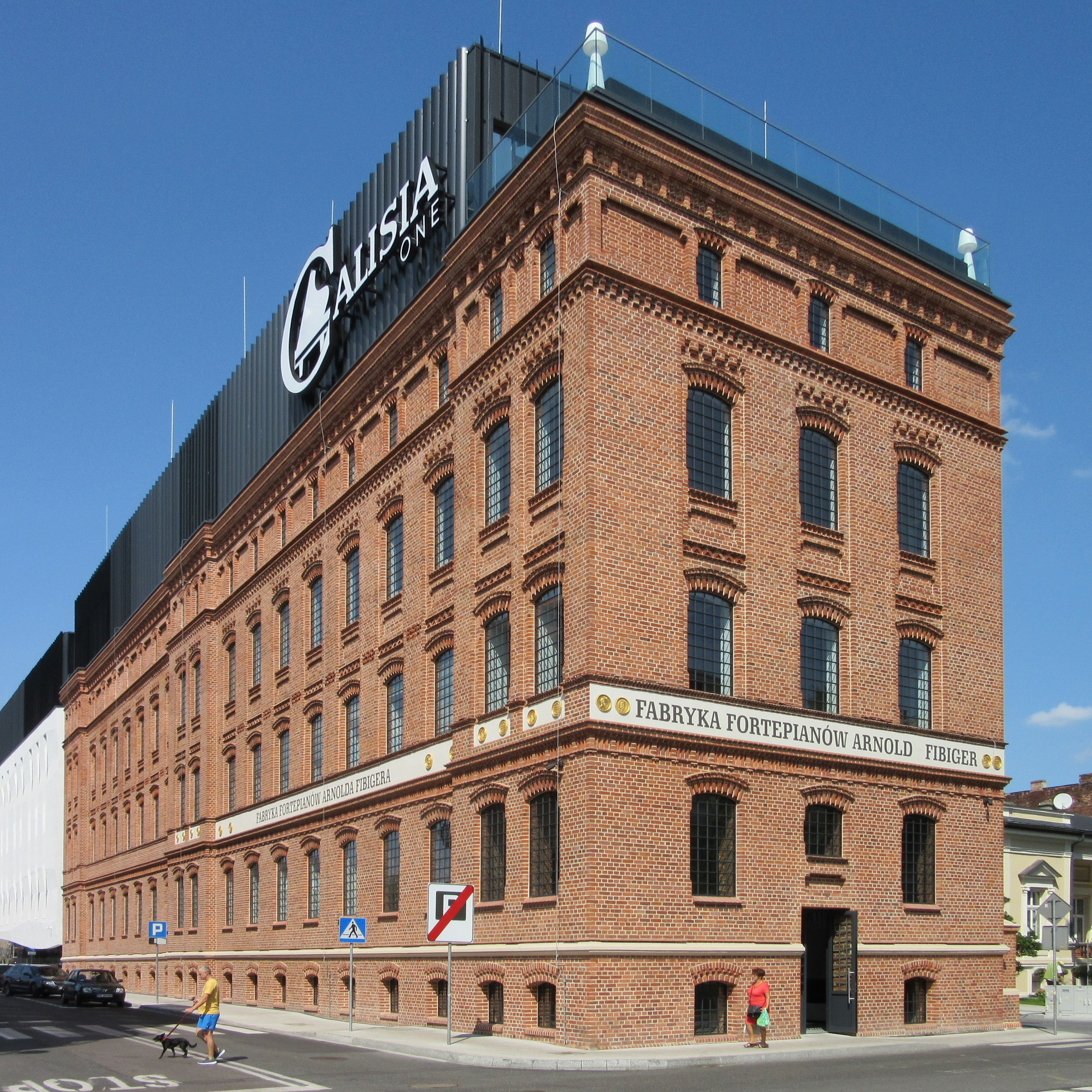 Zrewitalizowana dawna Fabryka Fortepianów i Pianin Arnolda Fibigera w Kaliszu, obecnie biurowiec Calisia One